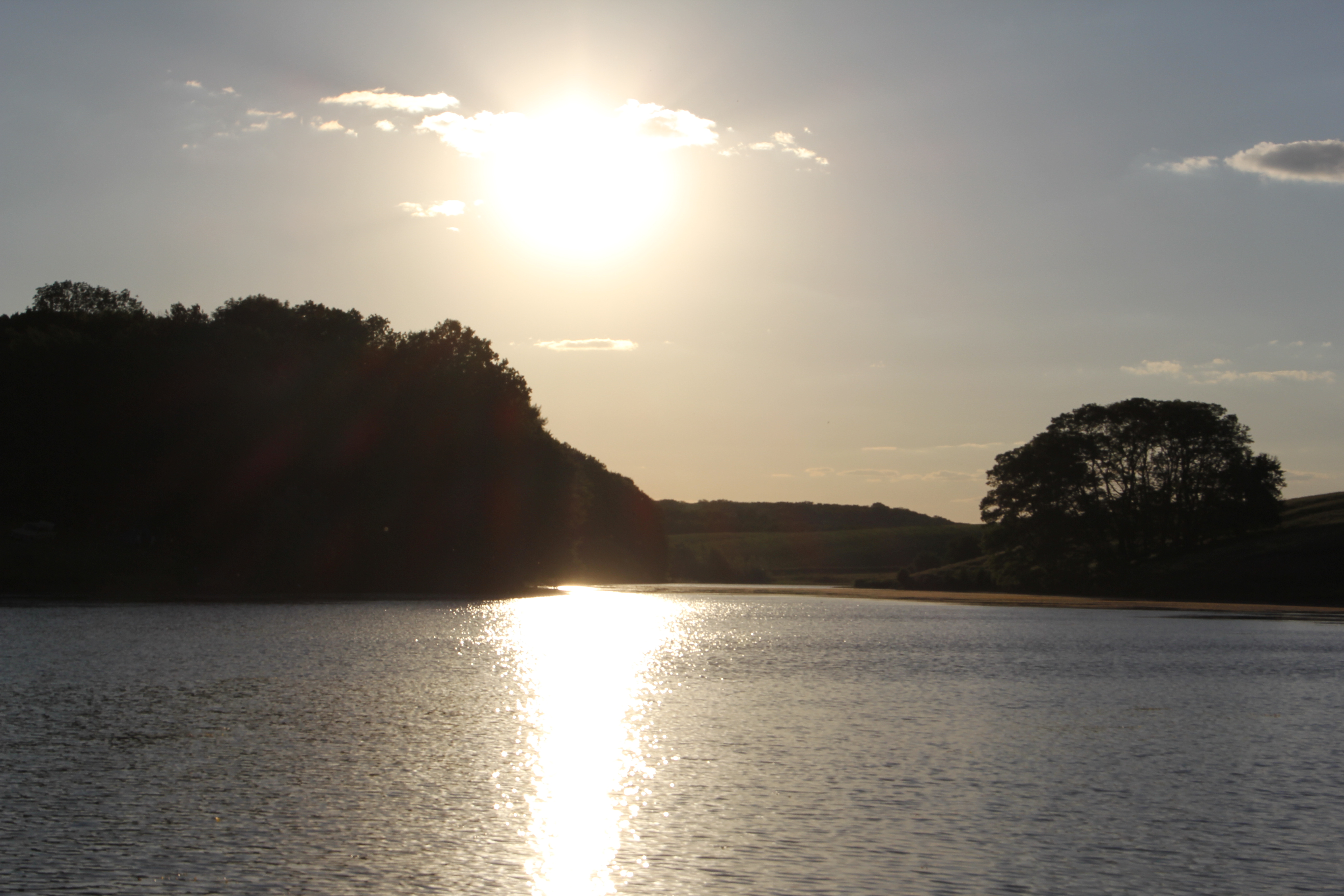 Плютинський став.